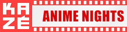 Kazé Anime Nights Logo